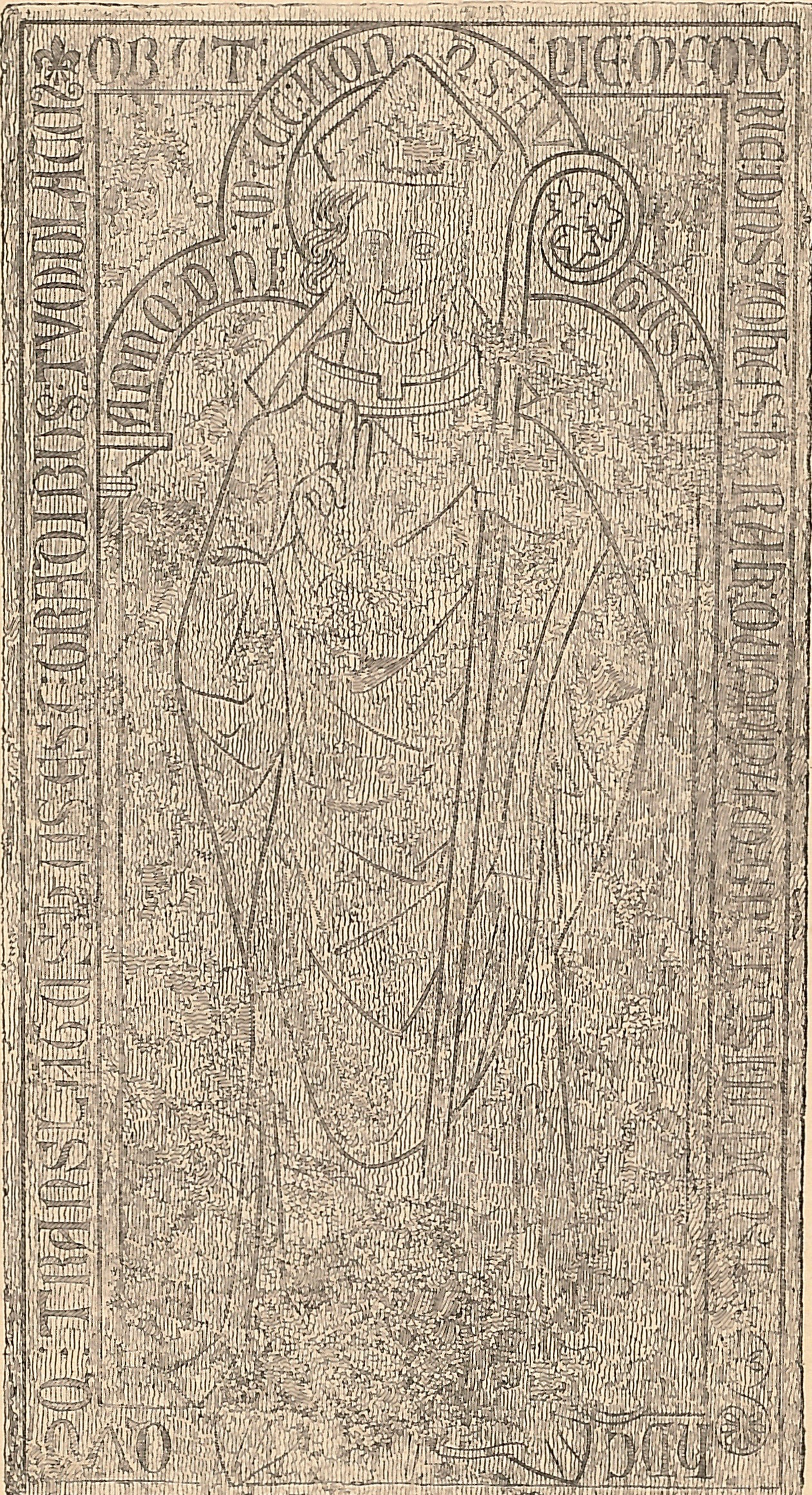 Tegning af ligsten for biskop i Roskilde fra 1290-1300, Johannes Krag, Sorø Klosterkirke. Fra: J. B. Løffler: Middelalderens Kirkelige Monumenter, 1888